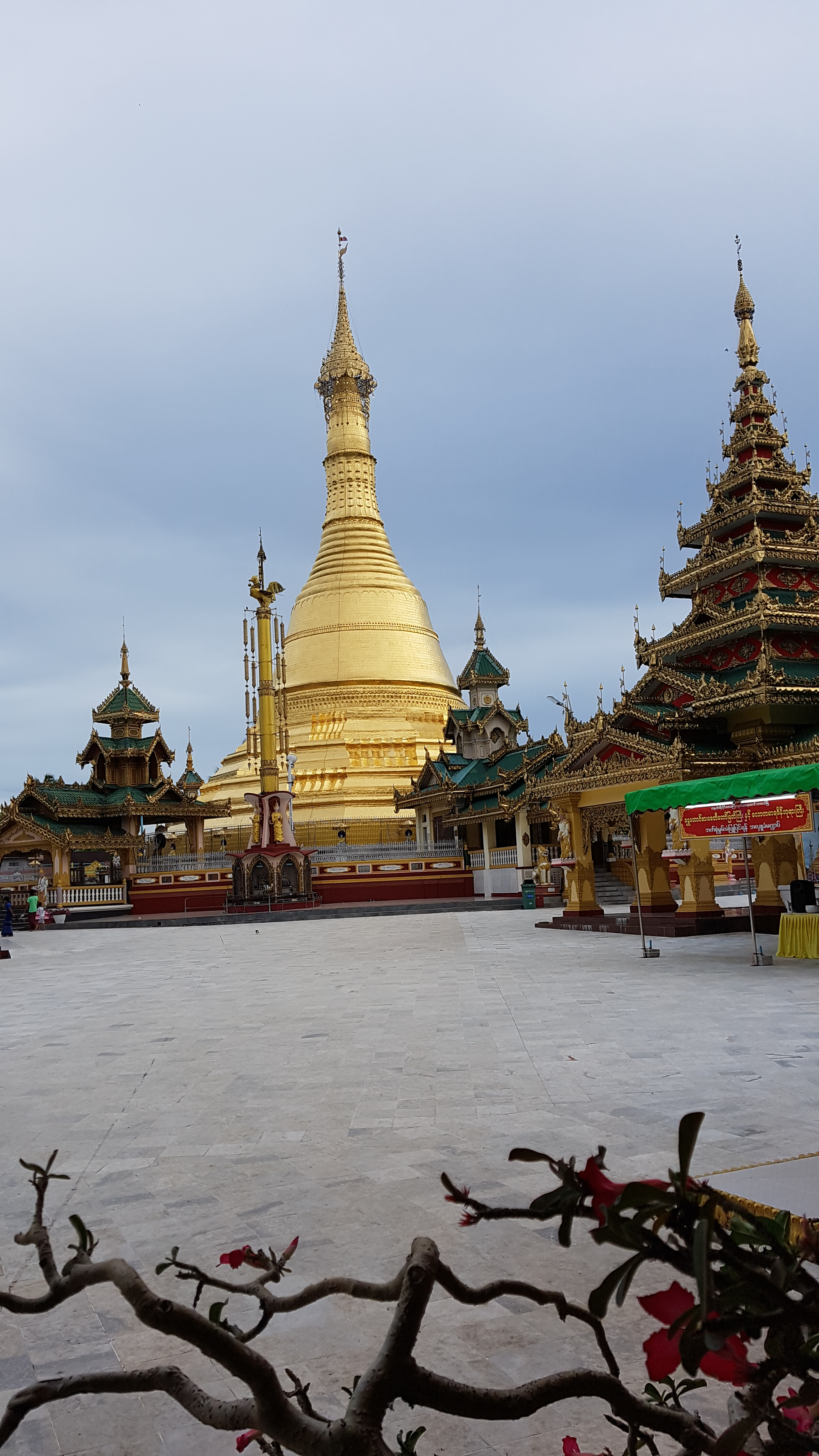 ​ရွှေ​တောင်စား​စေတီ​တော်